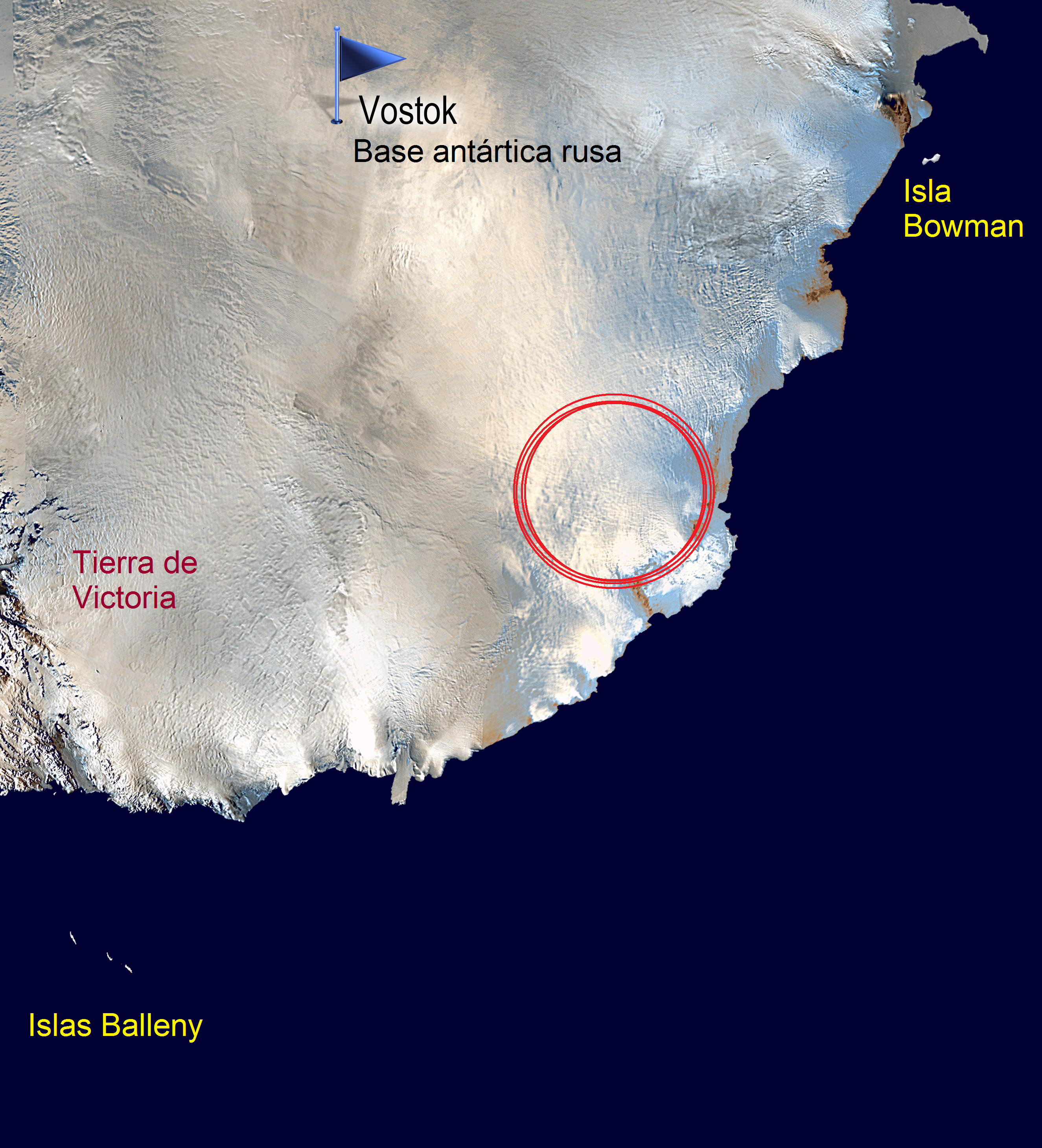 Localización aproximada del cráter de la Tierra de Wilkes, Antártida. Imagen realizada a partir del fichero file:Antarctica_Map_Swe.png